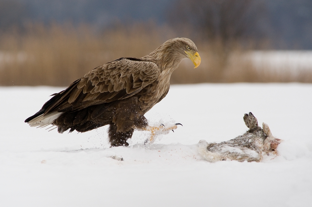 Haliaeetus albicilla, Jakubovské rybníky, Slovakia